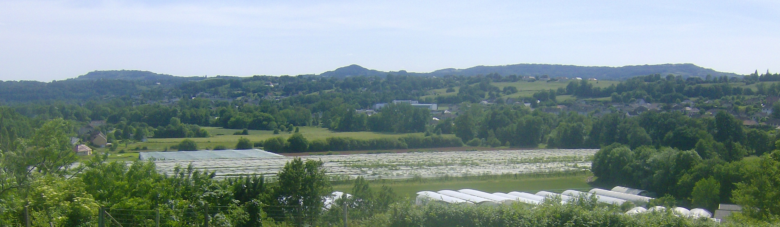 Vue du puy d'Yssandon, de la butte de Pampelonne et de la butte d'Ayen depuis la route au dessus du lycée horticole de Brive-Voutezac